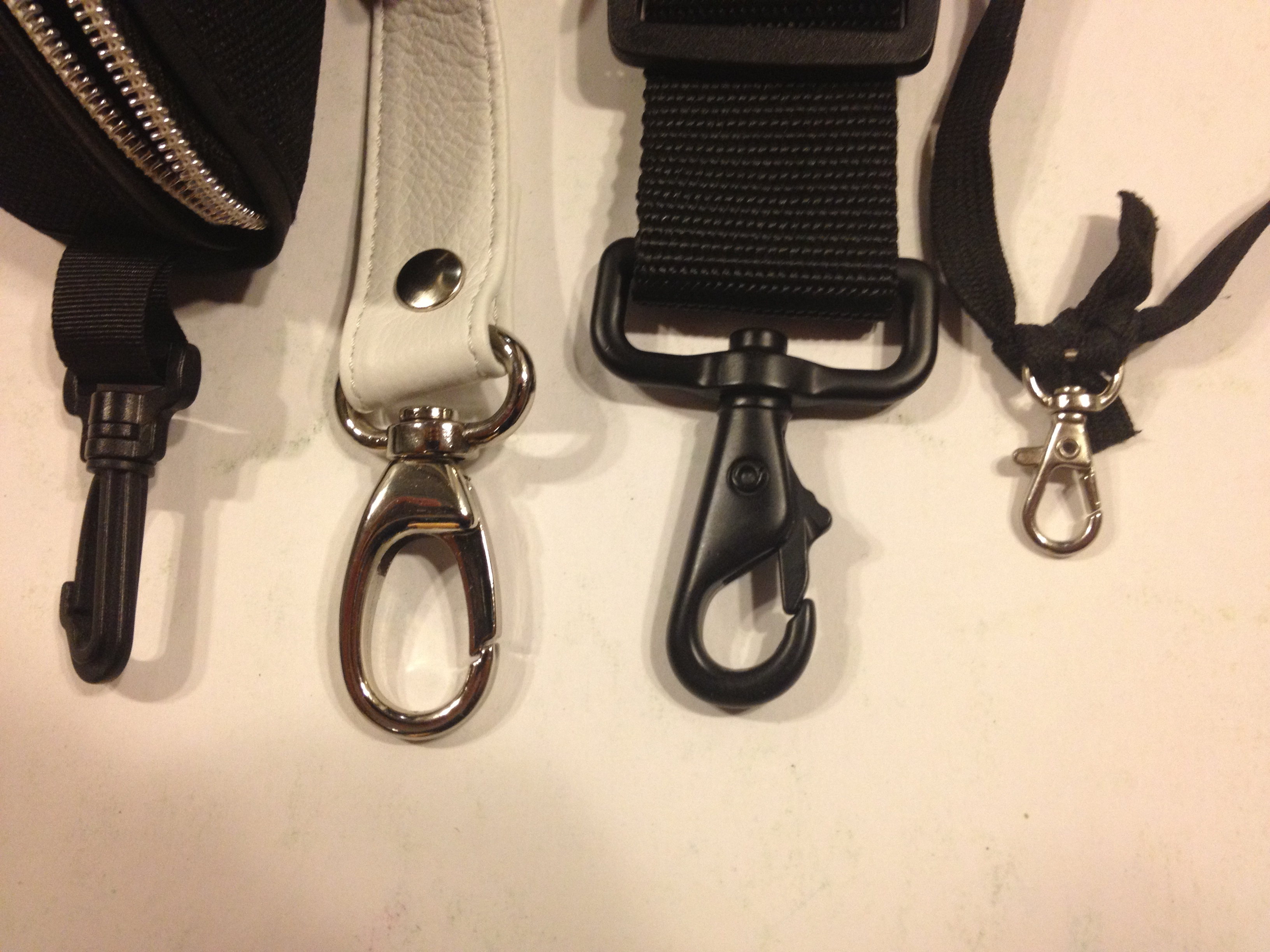 Вертлюги-антабки (галантерейная фурнитура)